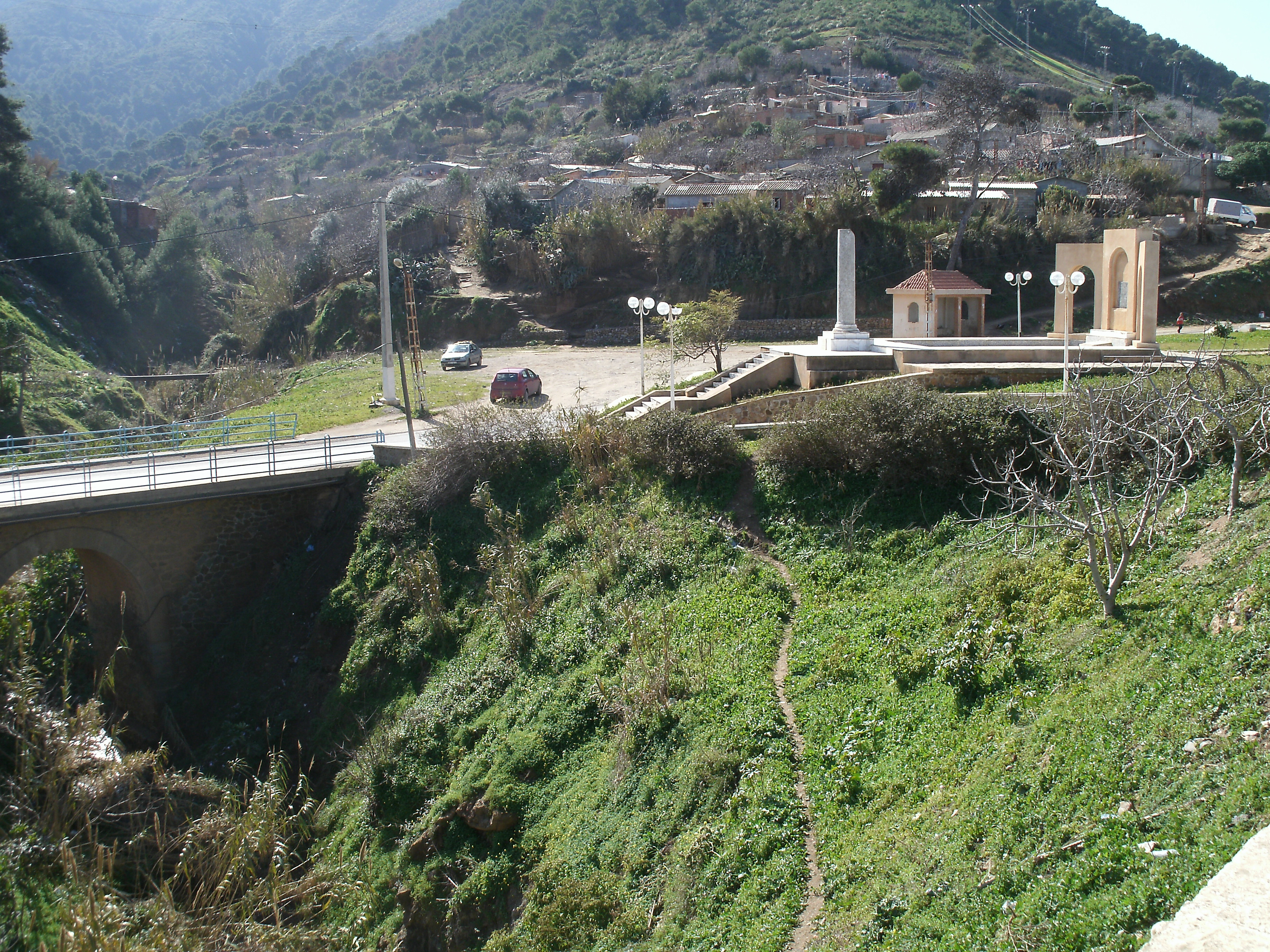 Stèle commémorative de l'accord interallié pour le débarquement en Afrique du Nord de novembre 1942